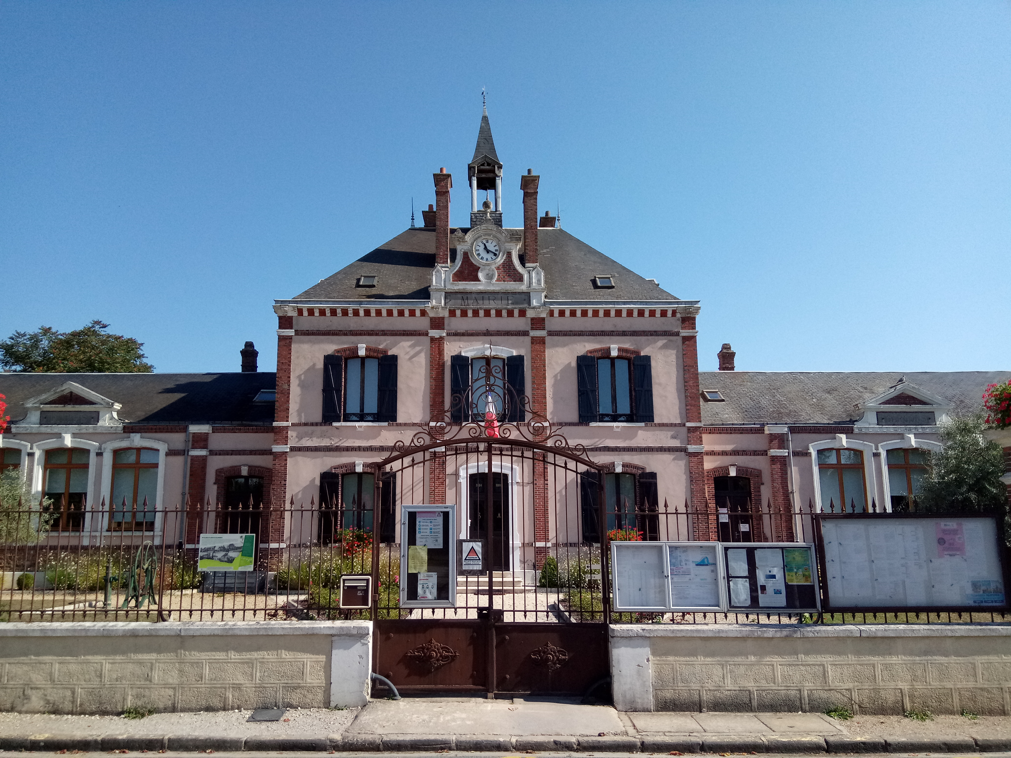 Mairie de Saint-Martin-de-Nigelles